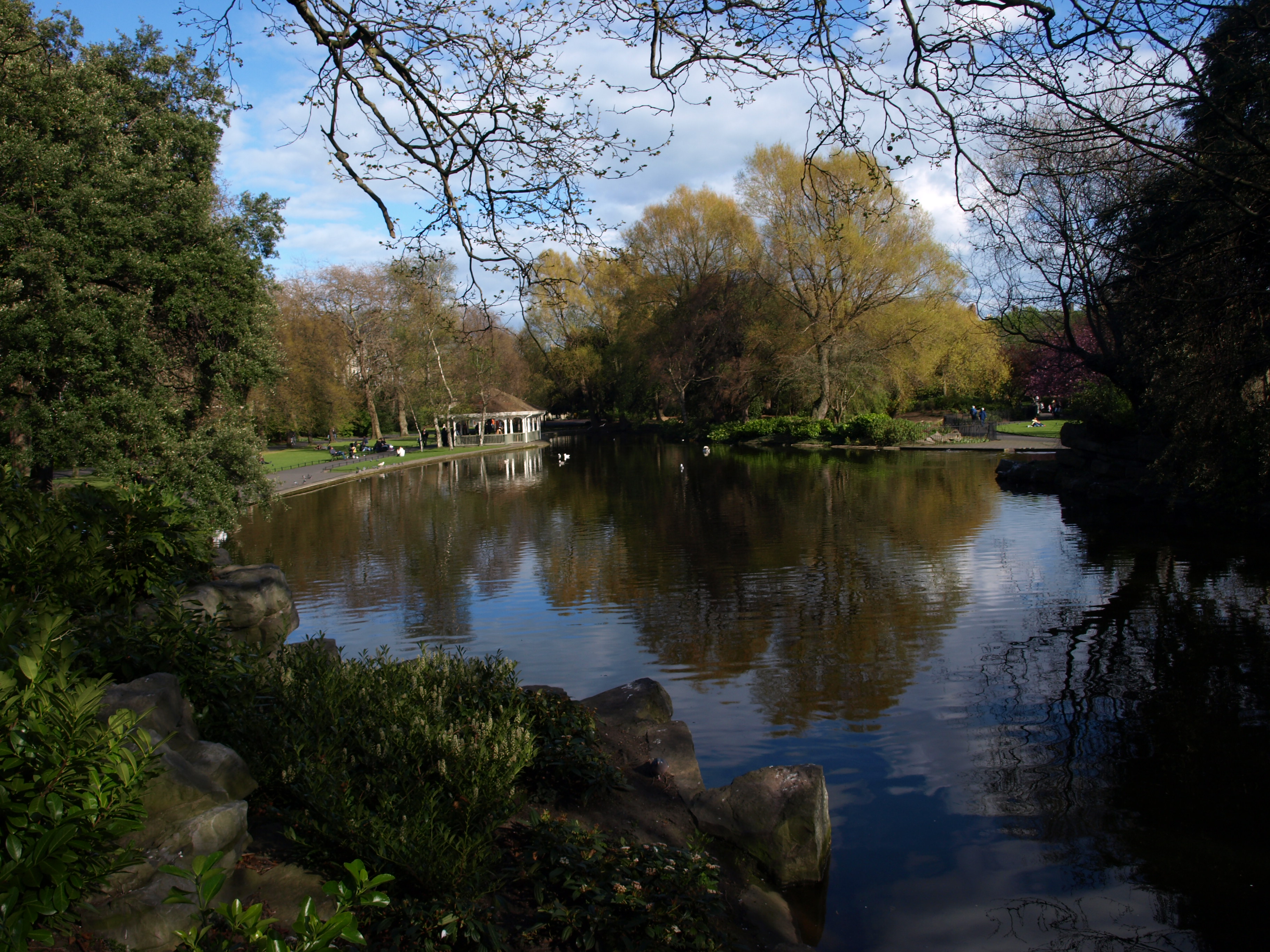 Parque de St Stephen´s Green en Dublín (Irlanda)